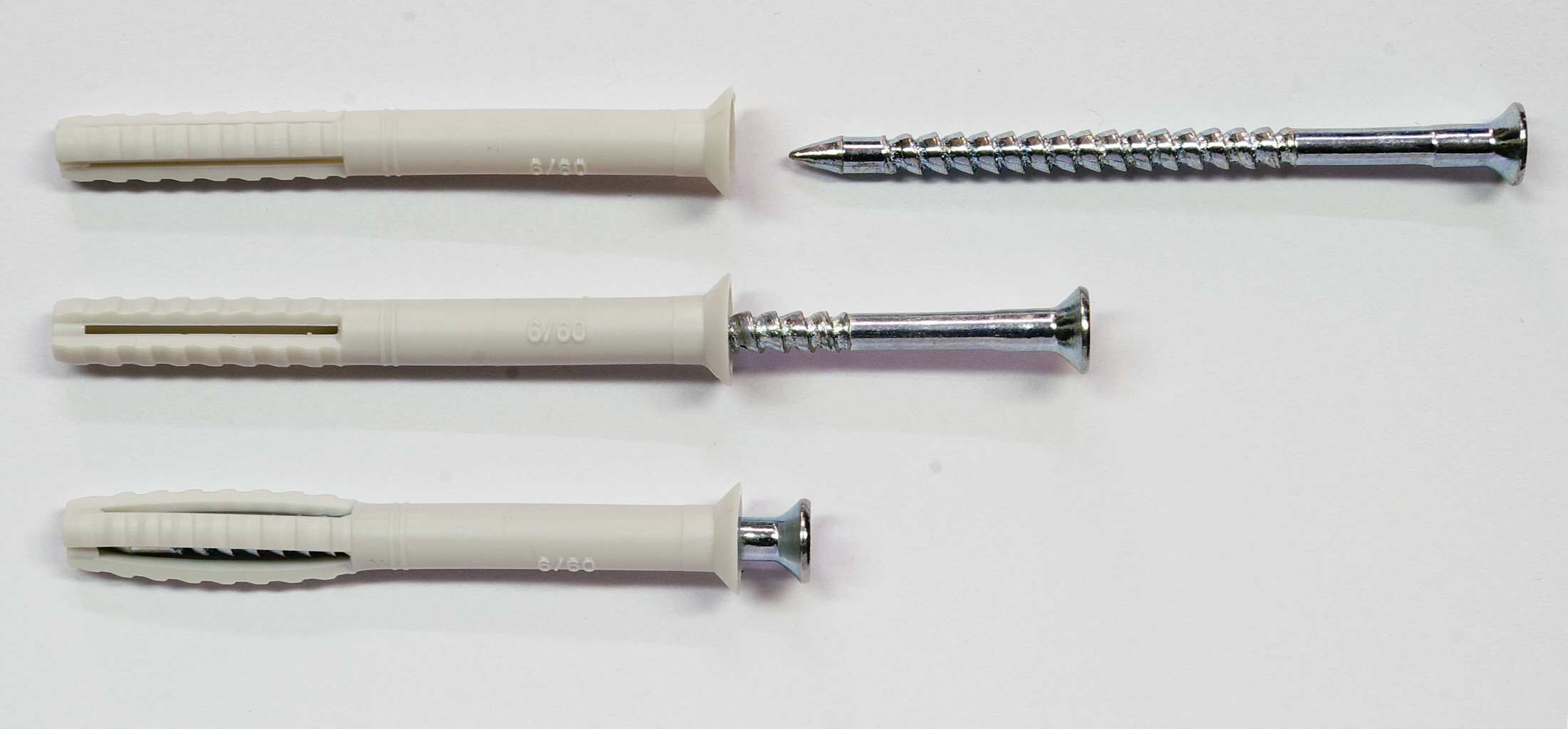 Nagel- oder Schlagdübel zur Verwendung in festen Werkstoffen